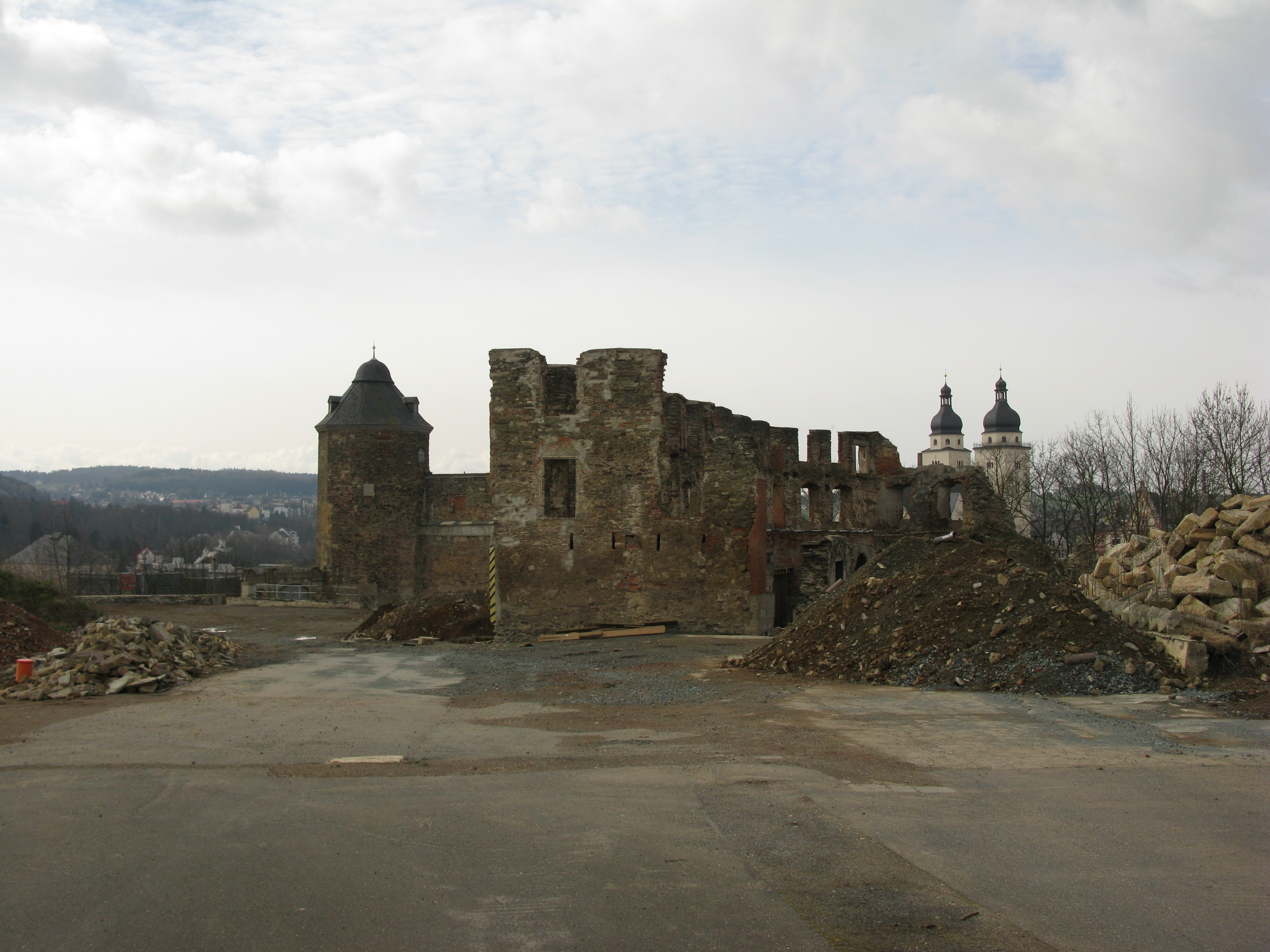 Plauen, freigelegte Ruinen des Schlosses der Vögte während des Umbaus zum Campus